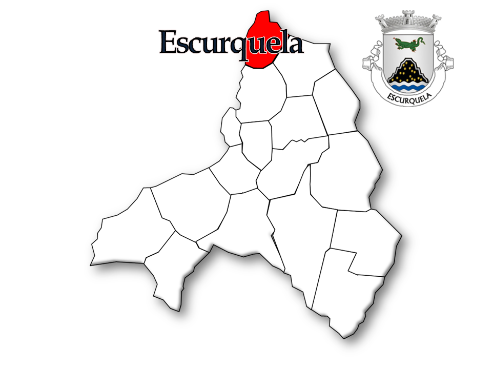 População